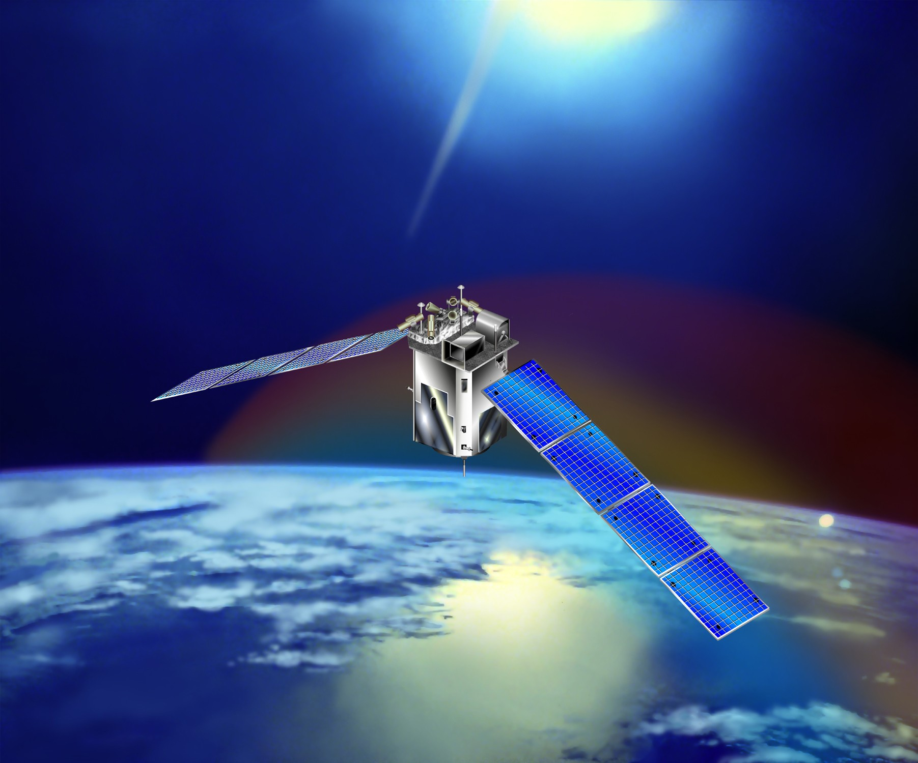 TIMED Satellite